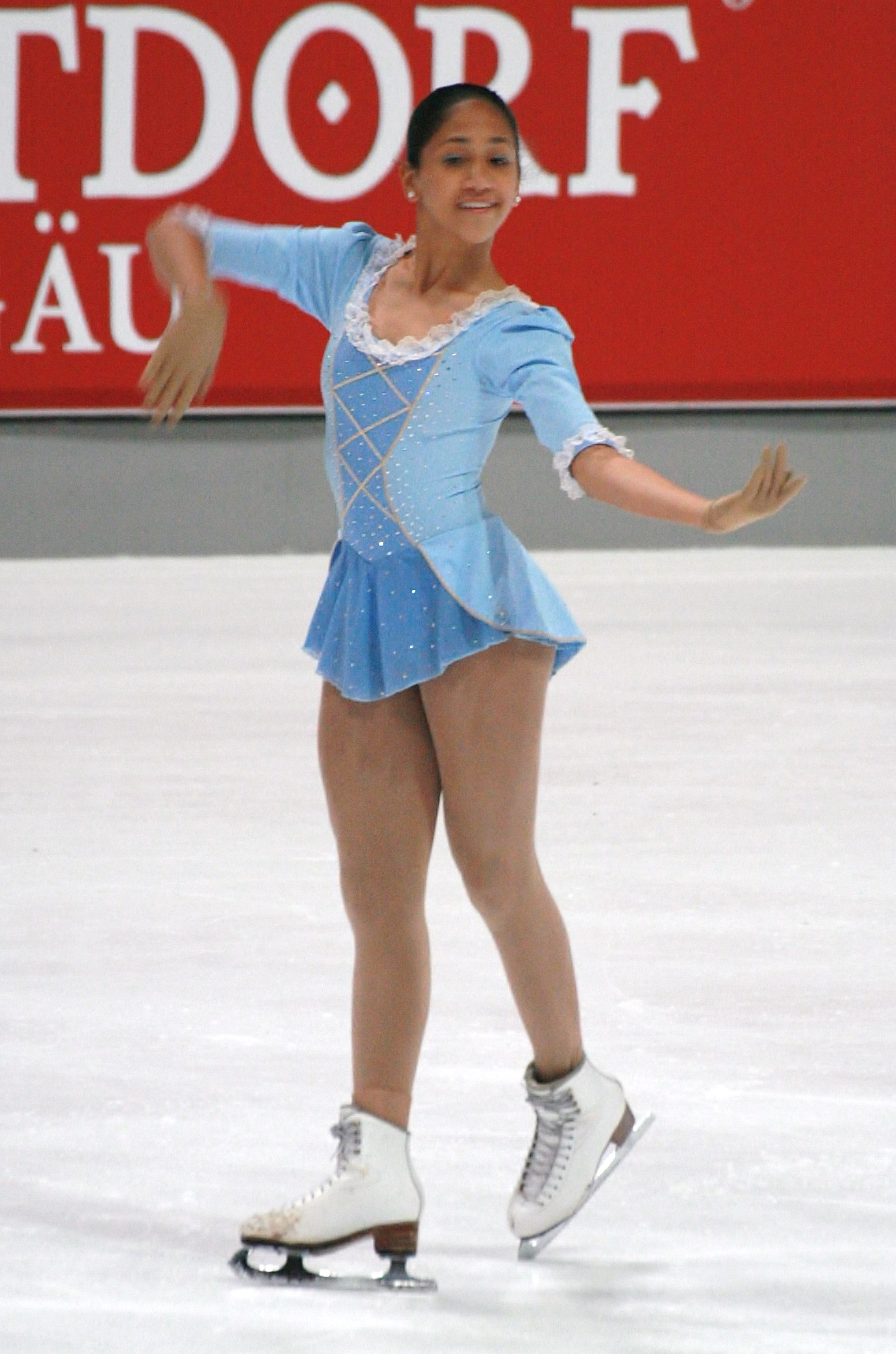 Эллисон Кристл Пертичето (Филиппины) на 2013 Nebelhorn Trophy